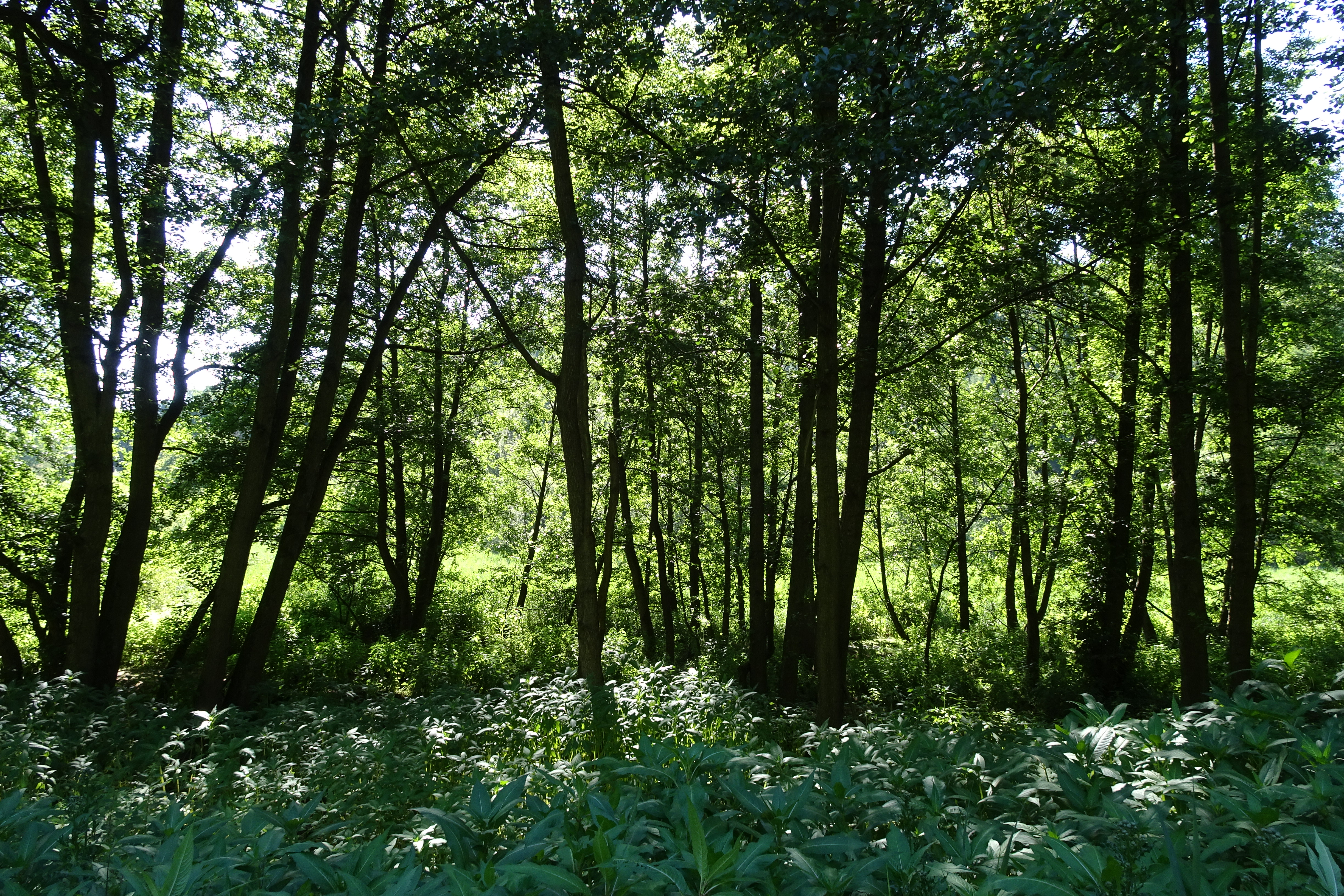 Das Naturschutzgebiet „Unterm Siegel bei Bebra“ liegt im Asmushäuser Grund östlich der B 27 in den Gemarkungen Bebra und Asmushausen der Stadt Bebra im Landkreis Hersfeld-Rotenburg. Es hat eine Größe von rund 8.8 Hektar. Zweck der Ausweisung zum Naturschutzgebiet im Jahr 1983 war es, die ökologisch bedeutsamen und vielgestaltigen brachliegenden Feuchtwiesen sowie einen naturnahen Abschnitt des Bebrabaches als Lebensraum bedrohter Tier- und Pflanzenarten zu sichern und zu erhalten.